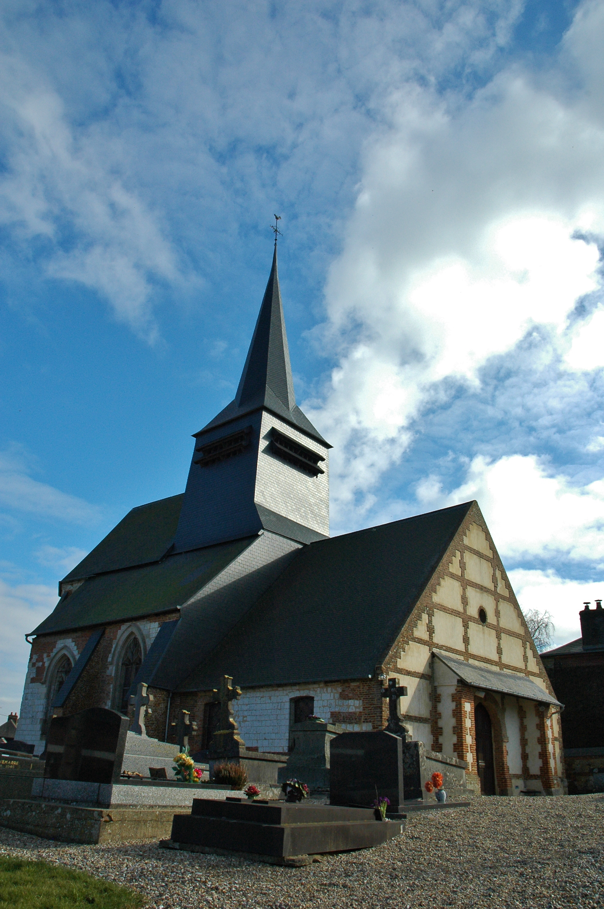 Église de Callengeville (Seine Maritime — France). Fin XVe siècle. Description plus complète voir la "Source" ci-dessous